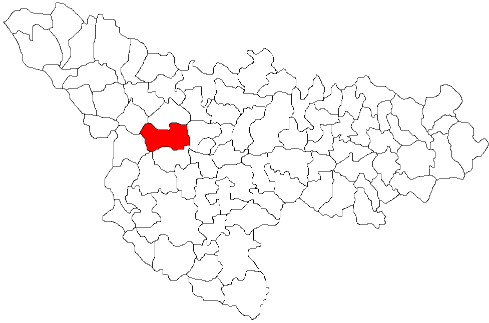 Categorie:Hărţi ale judeţului Timiş